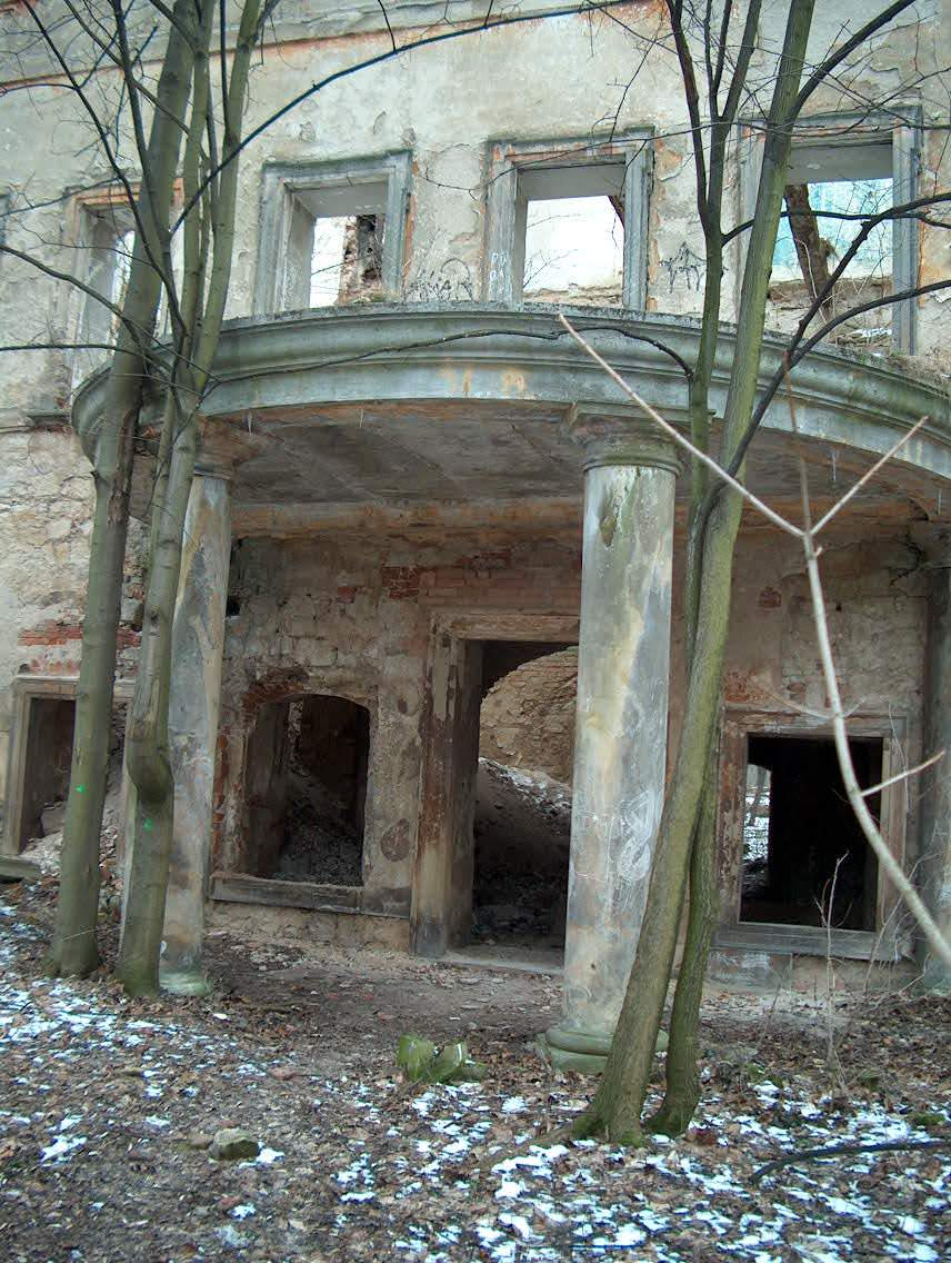 Polska. Powiat Lwówek Śląski, wieś Skała, ruiny pałacu.